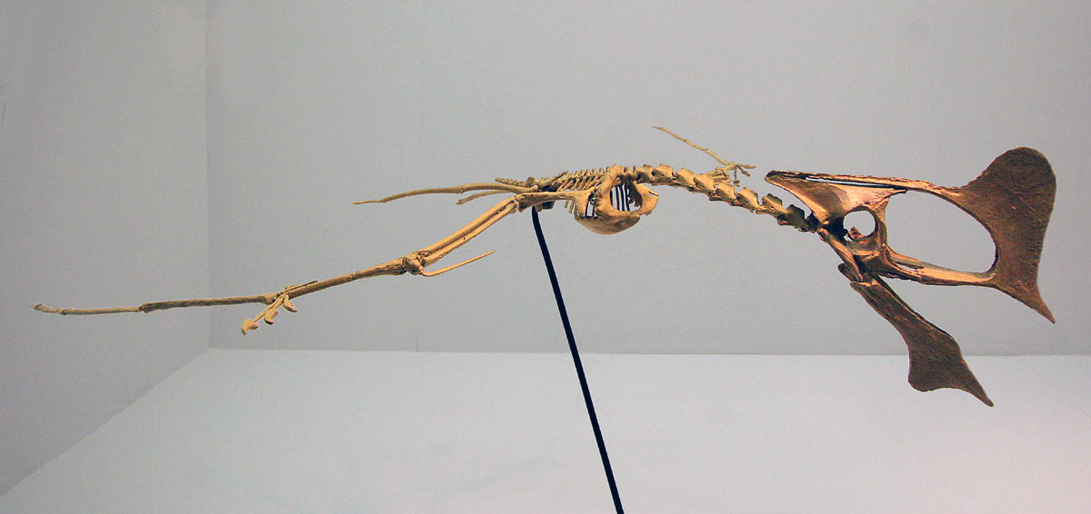 Tapejara - 01